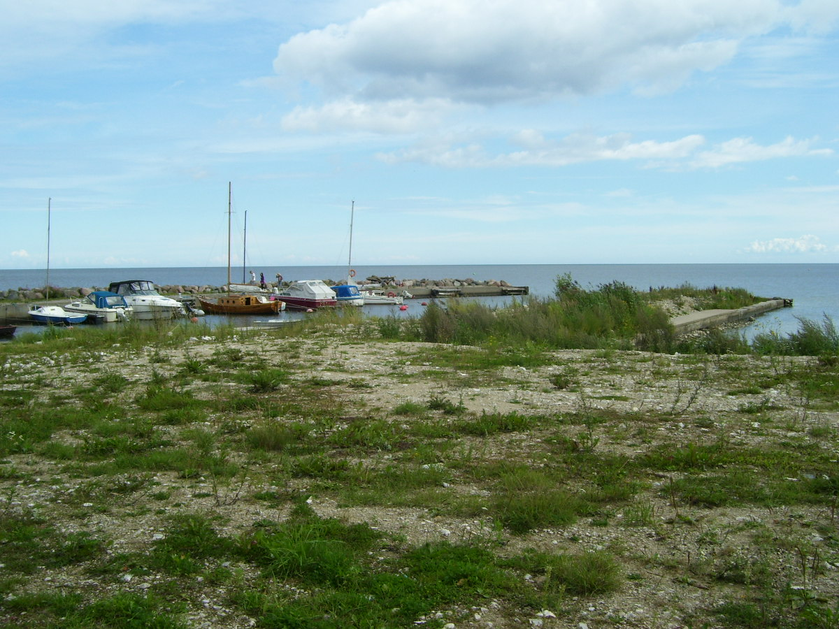 Kärdla sadamasild